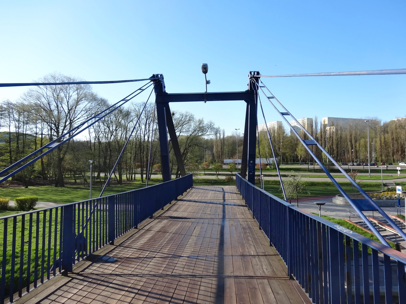 Most Esperanto na rzece Brdzie w Bydgoszczy